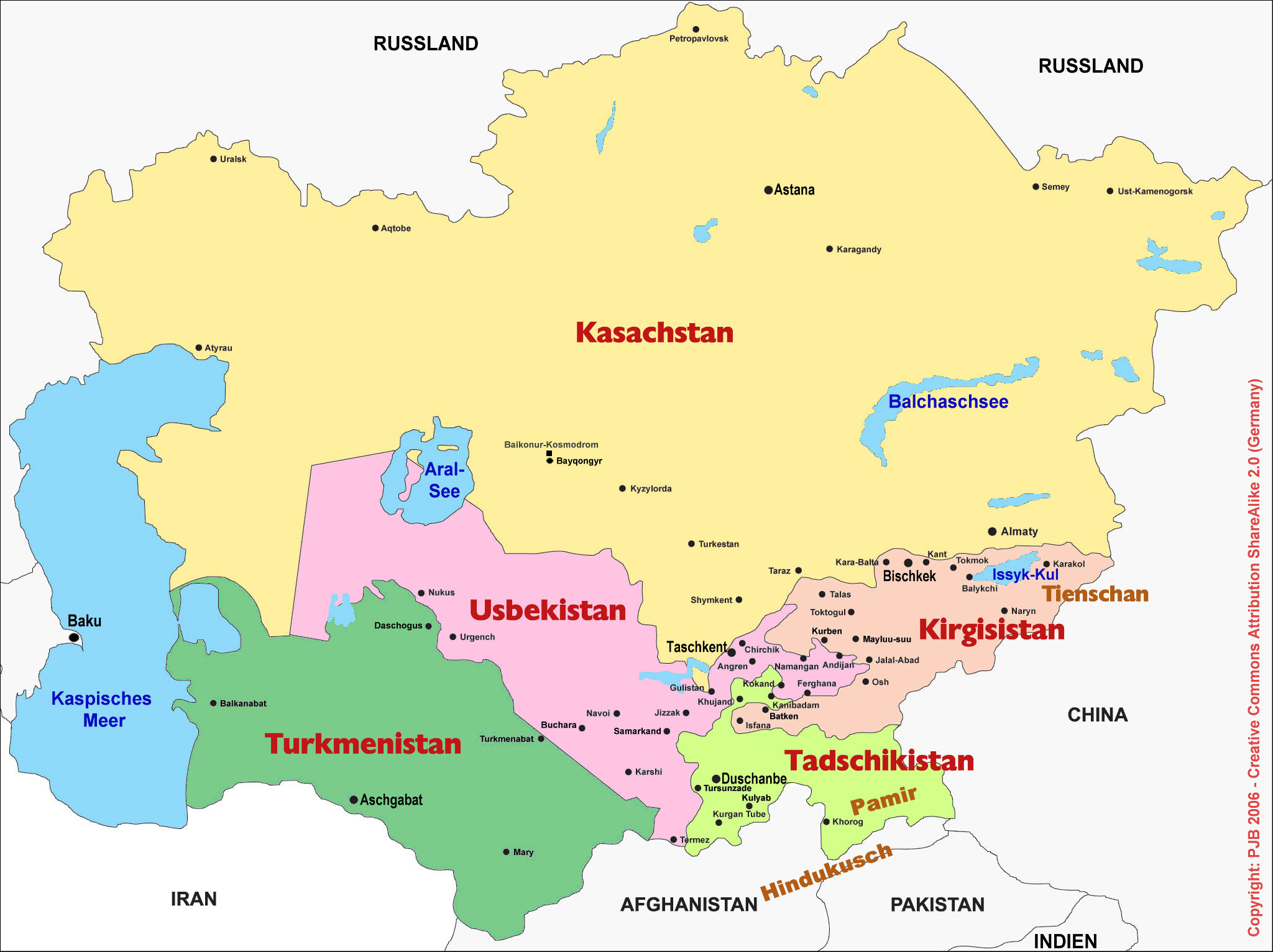 Zentralasien (politisch) - Stand: Ende 2005, Details siehe Diskussion!